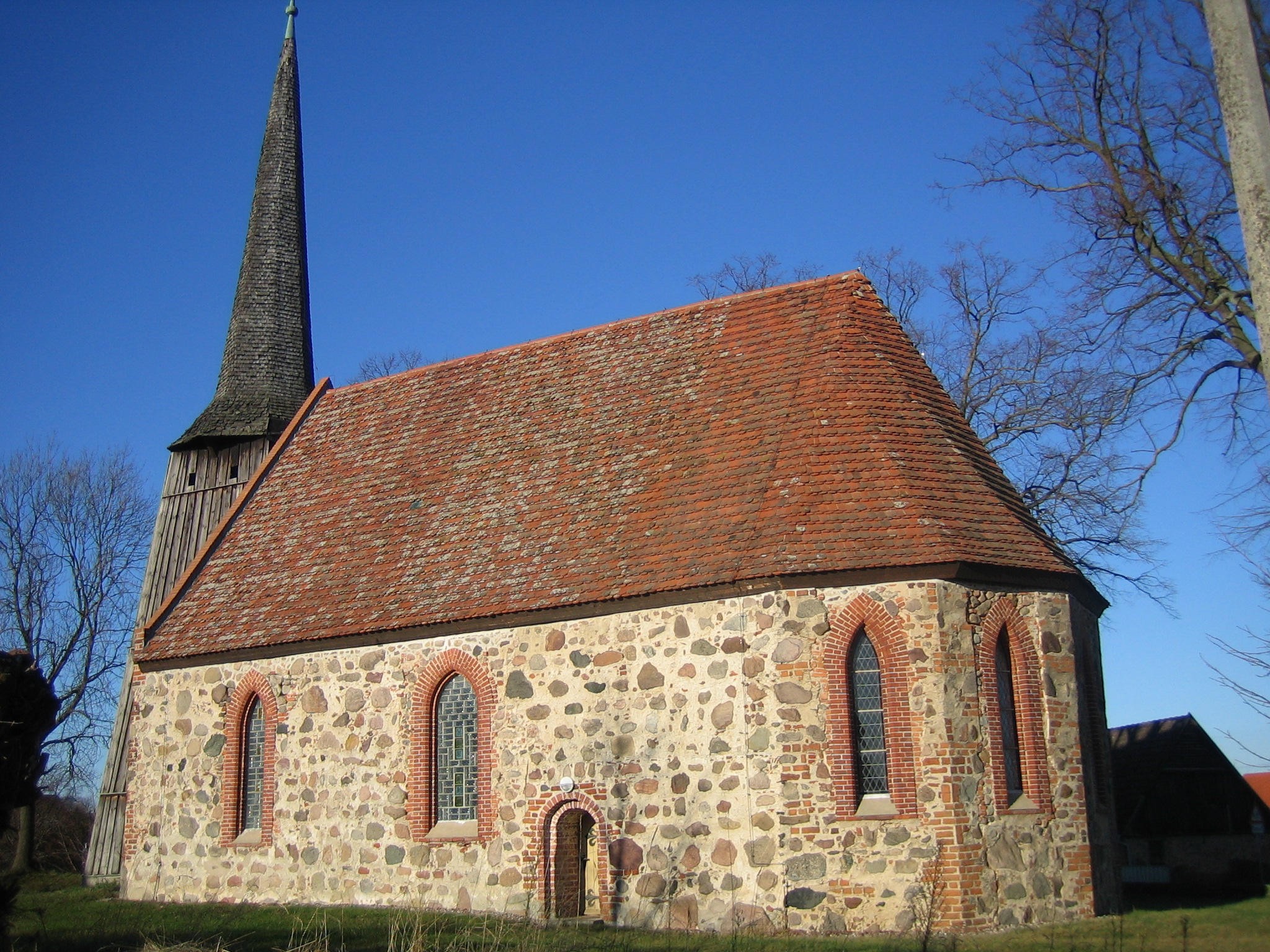 Dorfkirche von Bargensdorf, eingemeindeter Stadtteil von Burg Stargard (Landkreis Mecklenburgische Seenplatte)